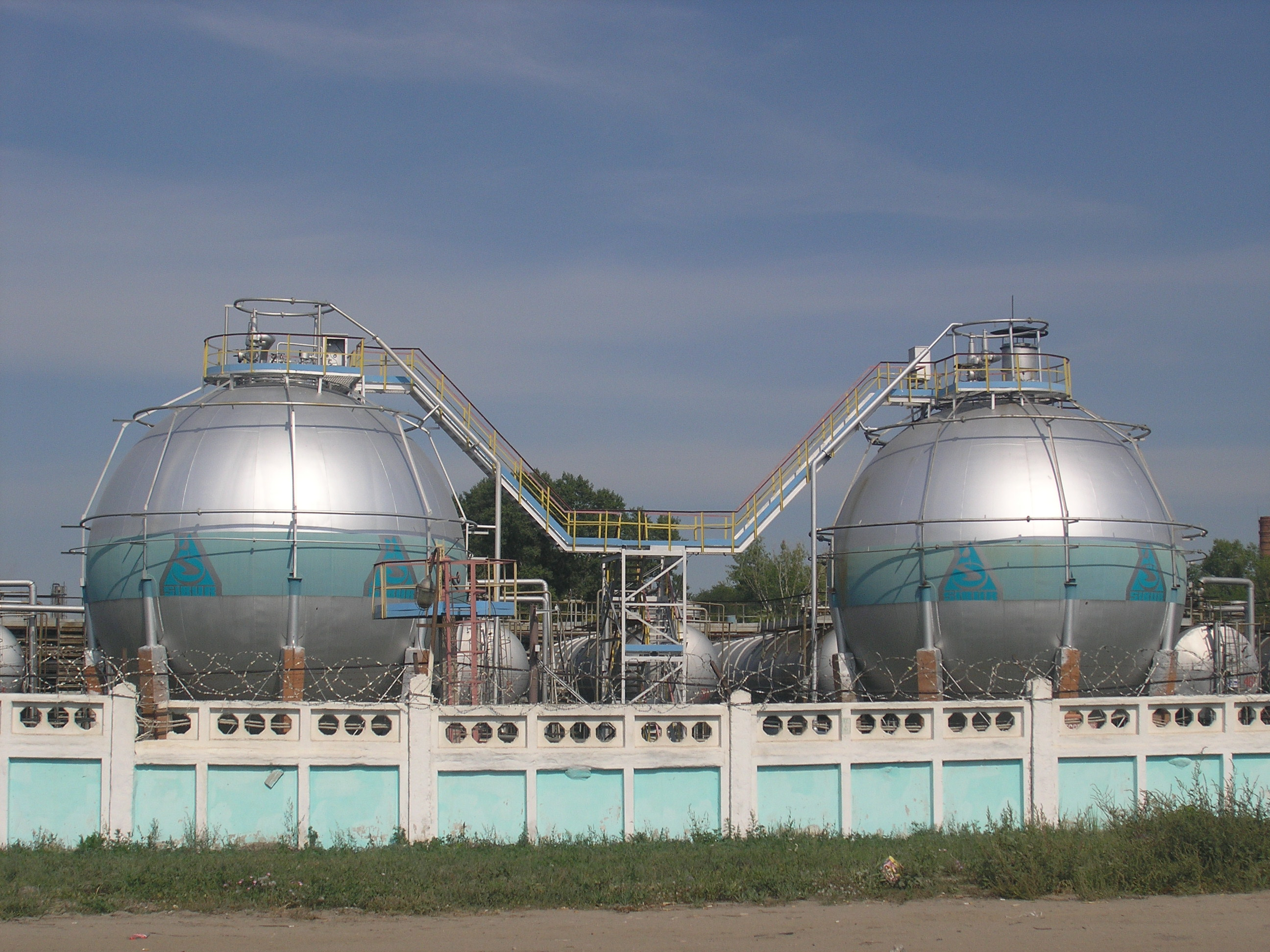 Производство на Тольяттикаучук